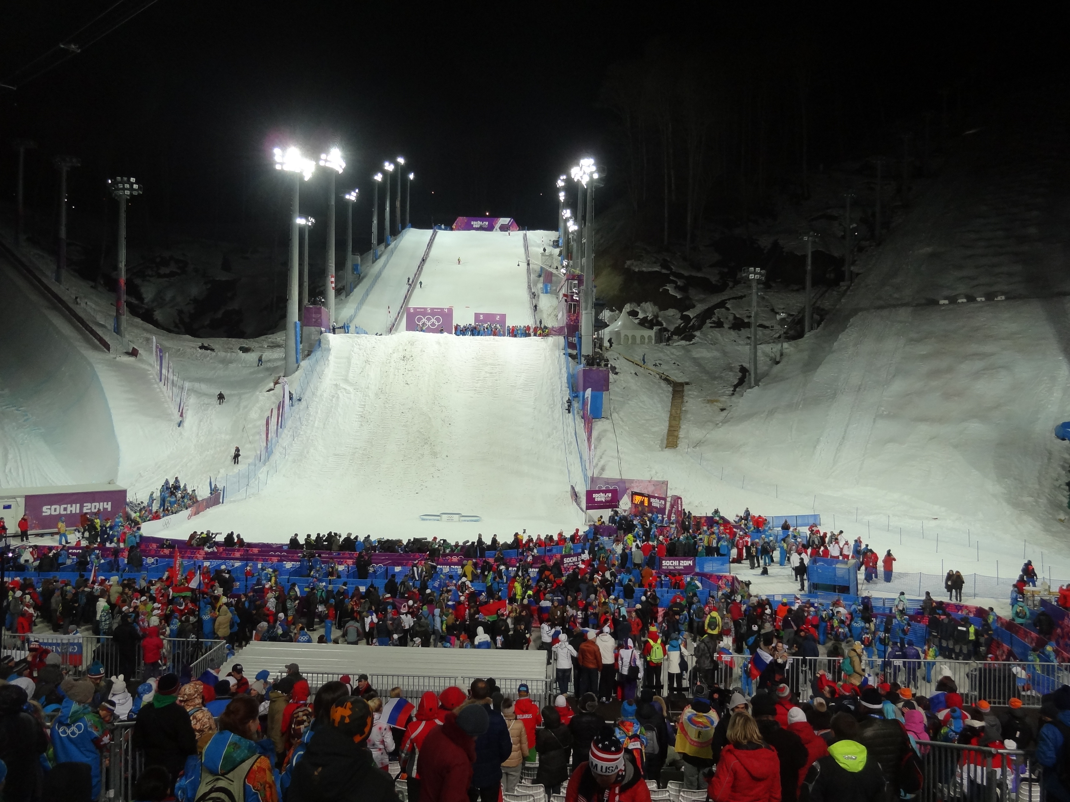 Экстрим-парк «Роза – Хутор» . Сочи, 17 февраля 2014 года. Мужской этап лыжной акробатики по фристайлу.